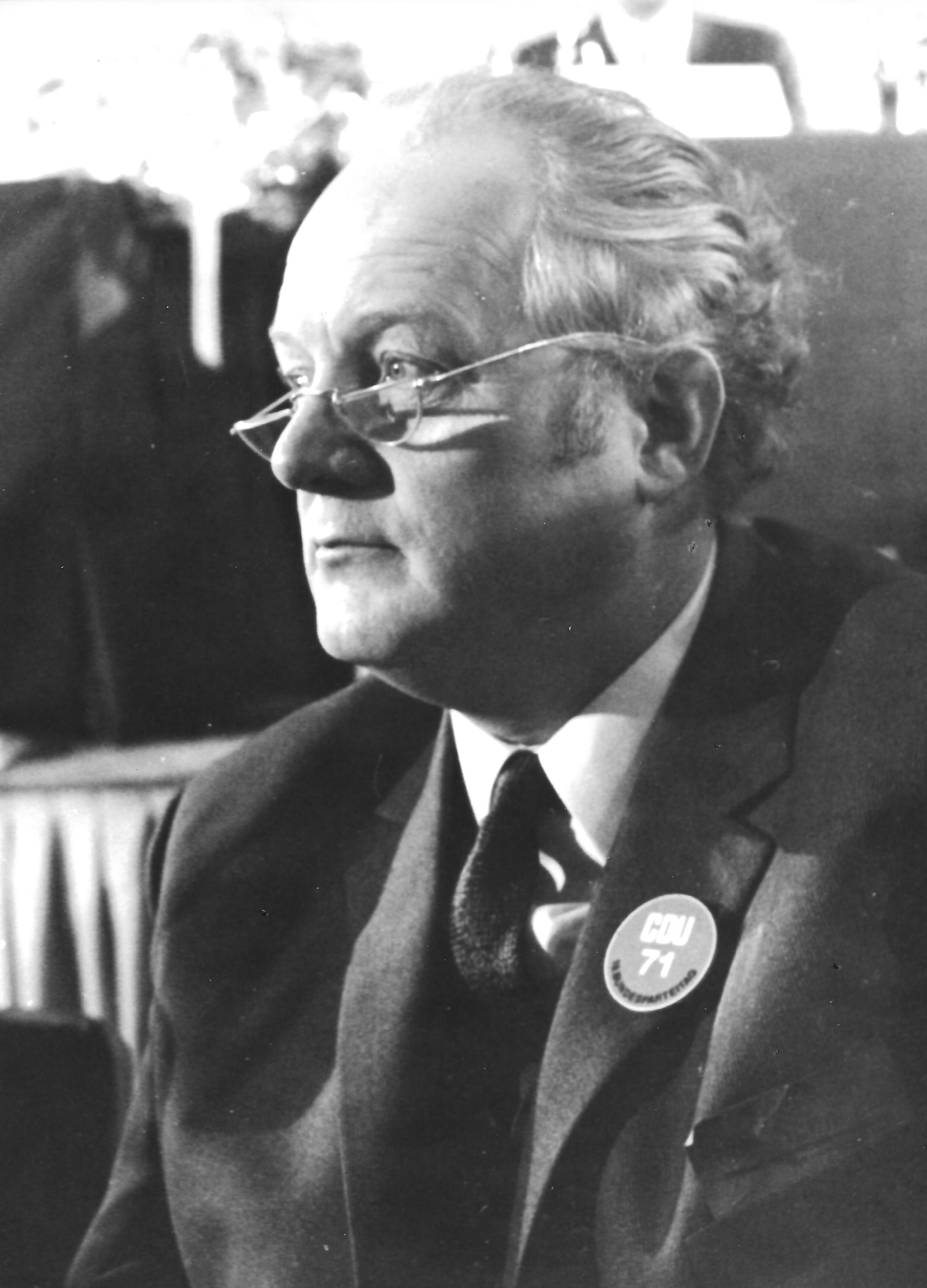 Kurt Schmücker; CDU-Bundesparteitag 1971 in Düsseldorf